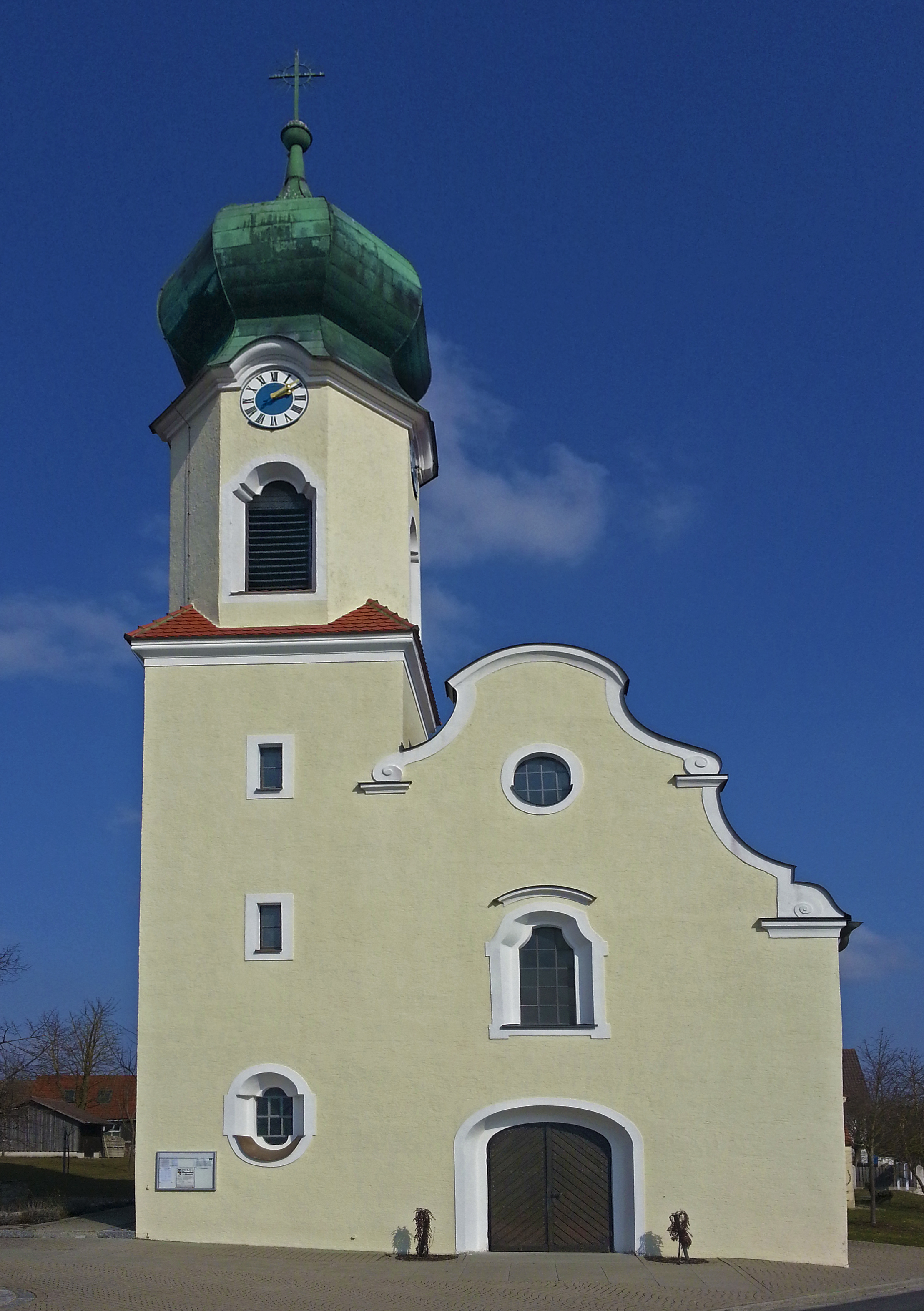 Pfarrkirche St. Mauritius in Willenhofen